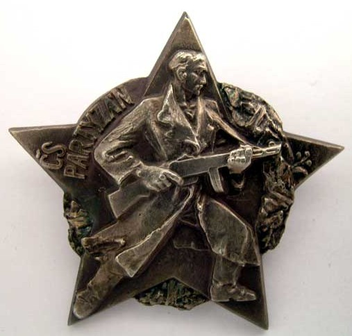 Odznak Československého partyzána